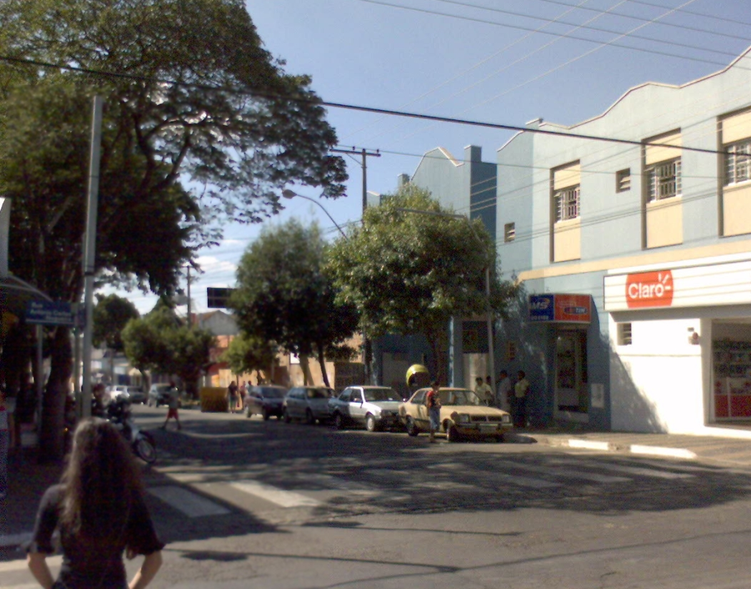 Centro. Cosmópolis, São Paulo, Brasil